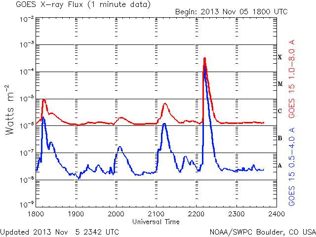 The November 5, 2013 X3,3-class solar flare erupted by AR1890. Record from the GOES 15 X-ray Flux real-time monitor (3 days, 5-min data).